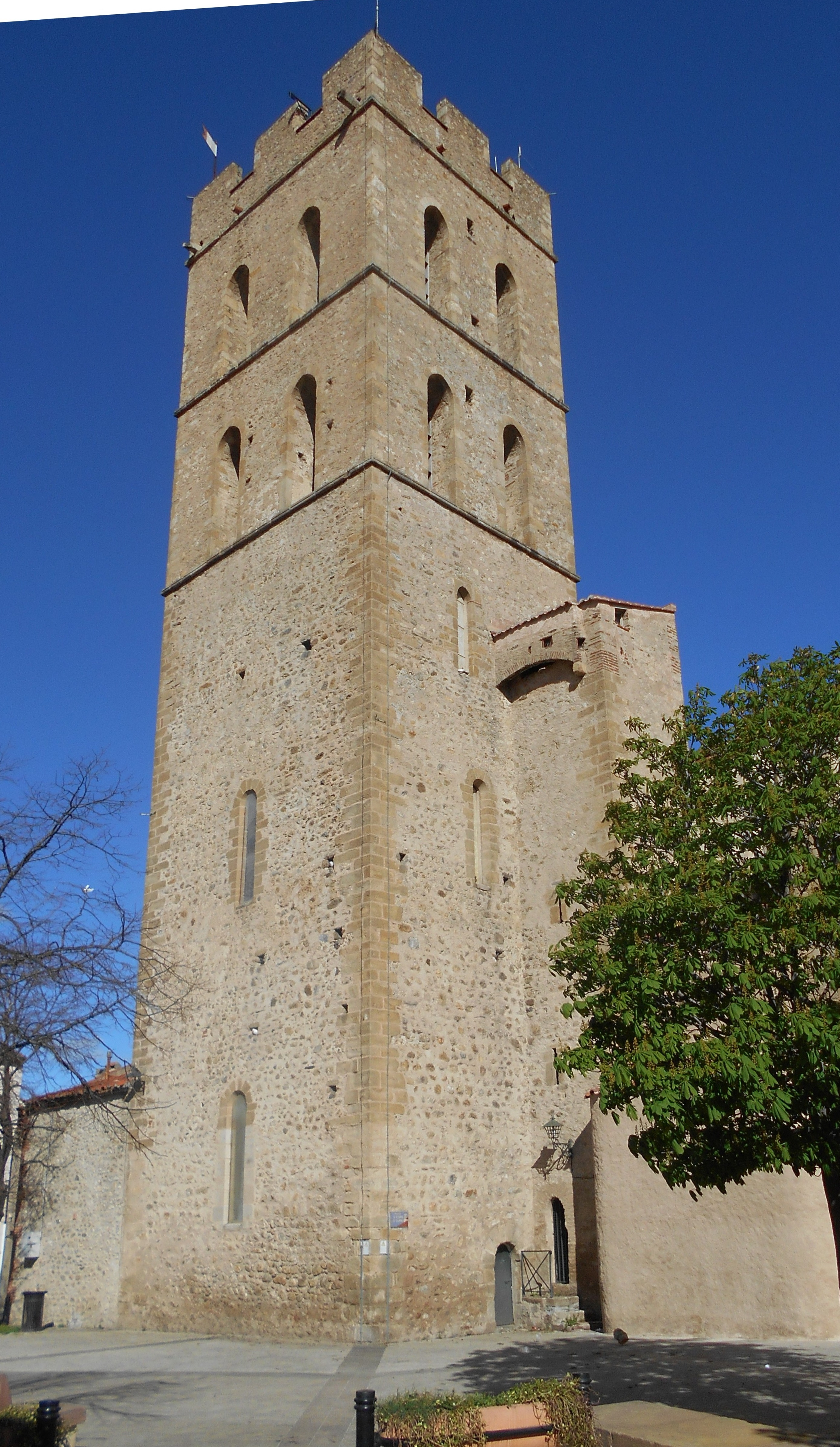 Campanar de l'església parroquial de Santa Maria del Prat, d'Argelers de la Marenda